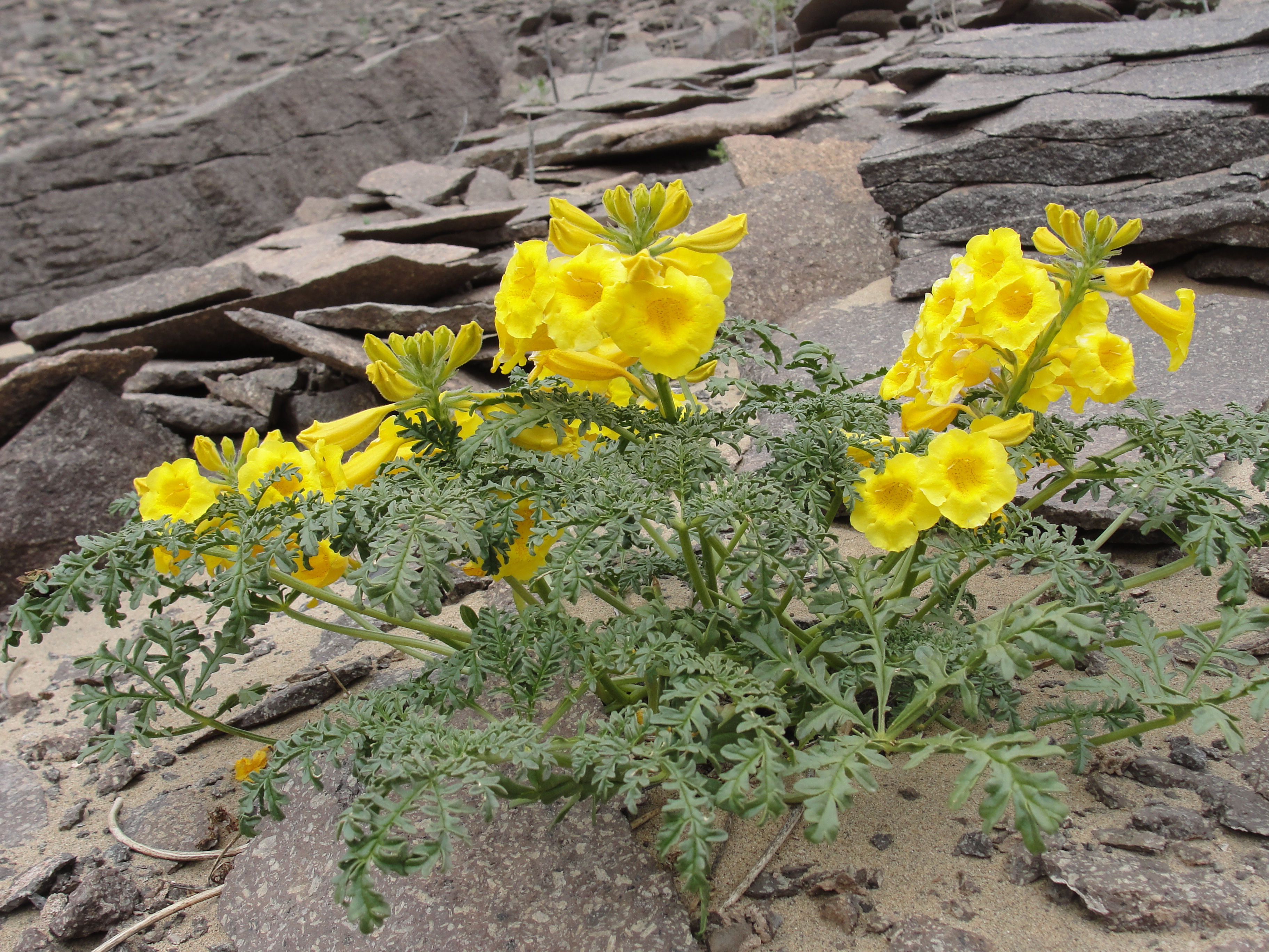 Especie fotografiada en la cordillera costera de Antofagasta chile.